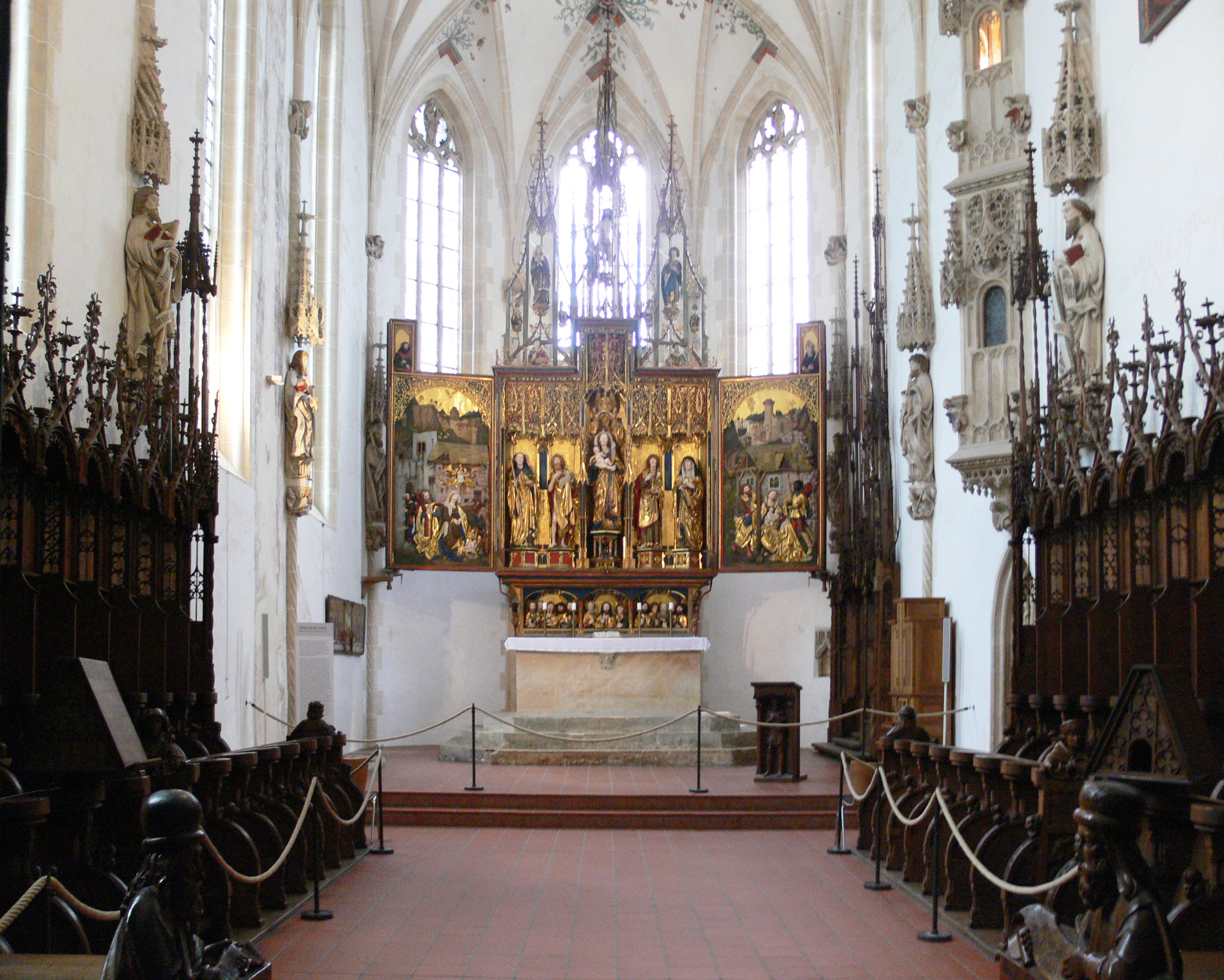 Kloster Blaubeuren, Klosterkirche, Blick in den Chorraum mit Chorgestühl und Hochaltar